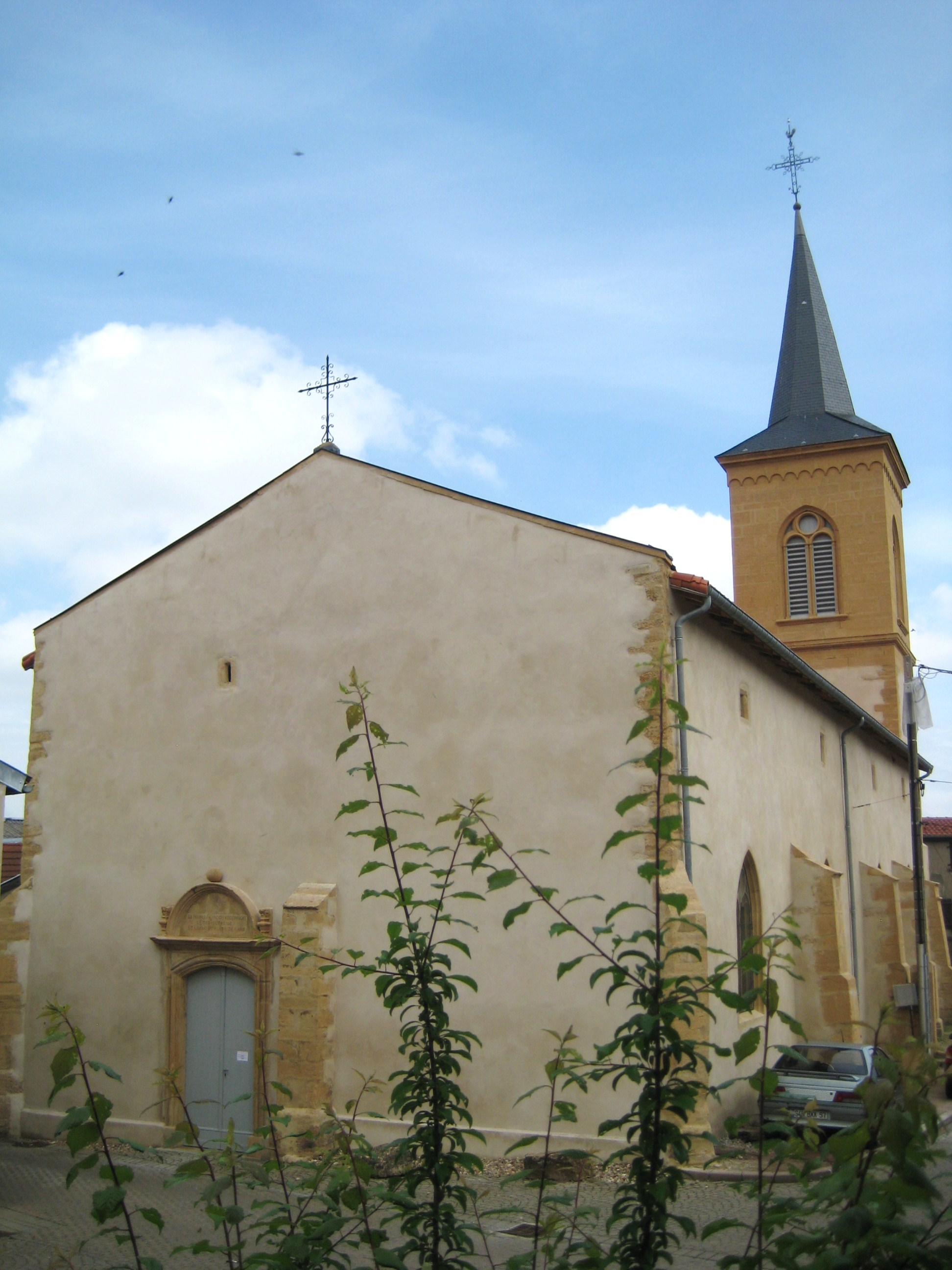 Église de Pierrevillers